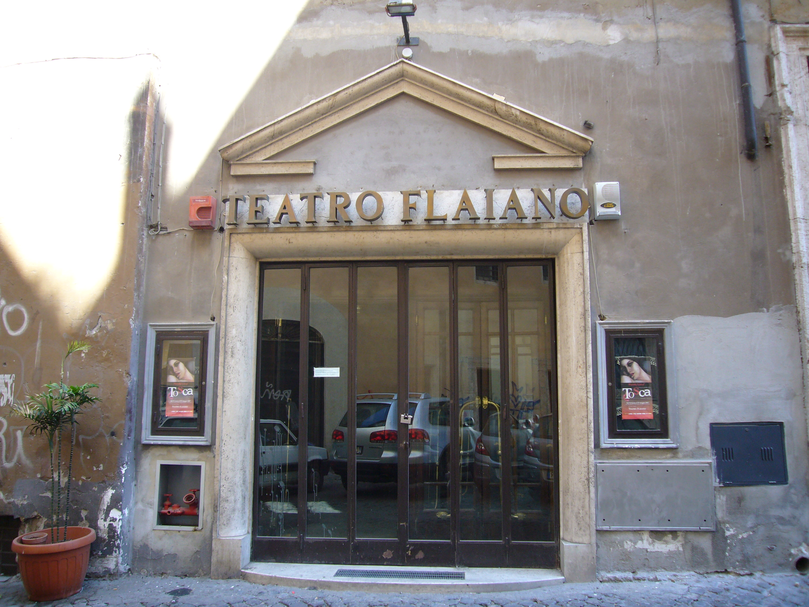 Roma, Teatro Flaiano a via s. Stefano del Cacco